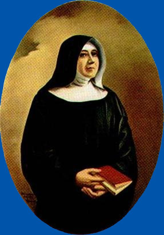 Siostra Kolumba Gabriel